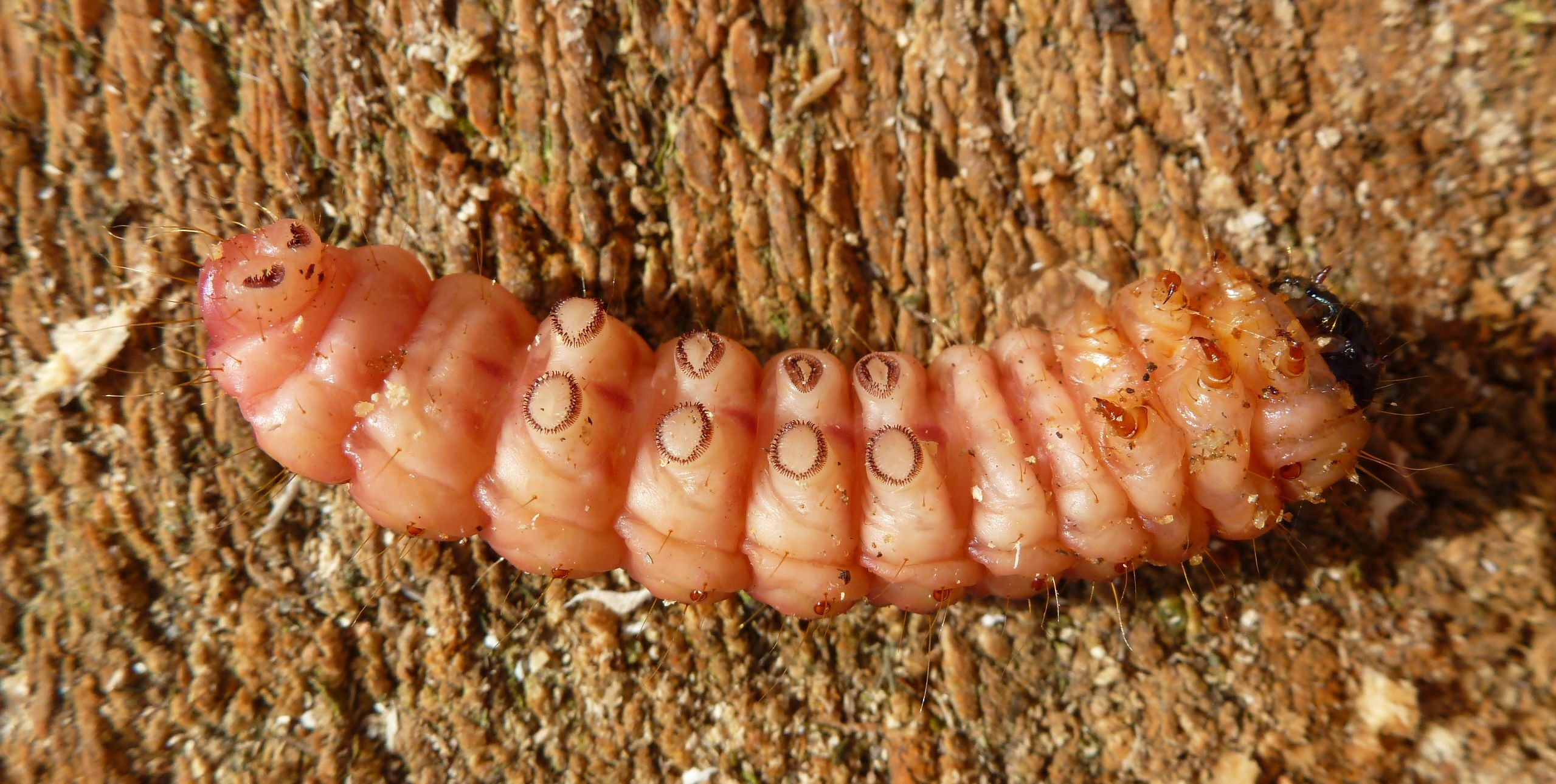 Unterseite der Raupe des Weidenbohrers (underside)